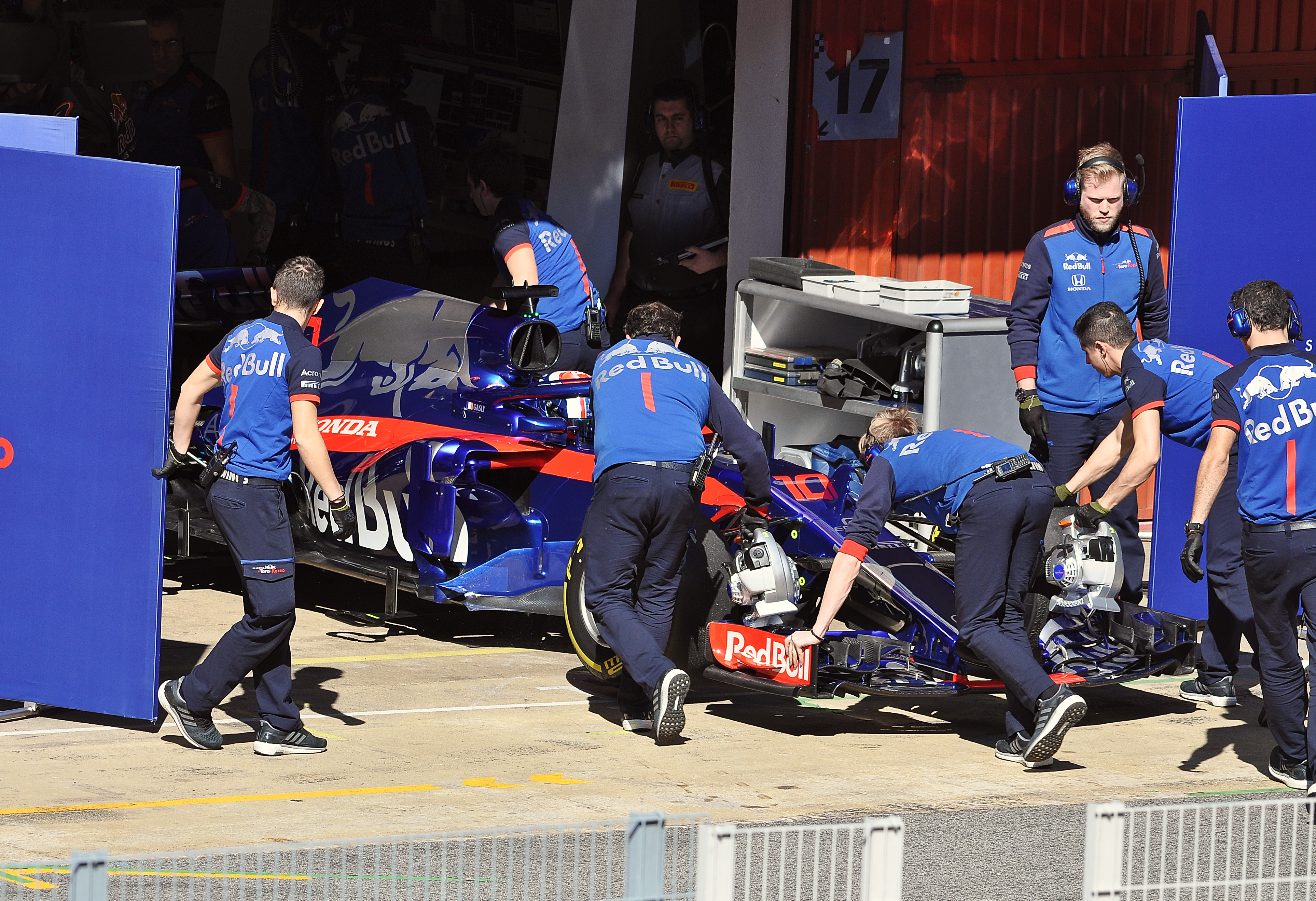 Toro Rosso STR13